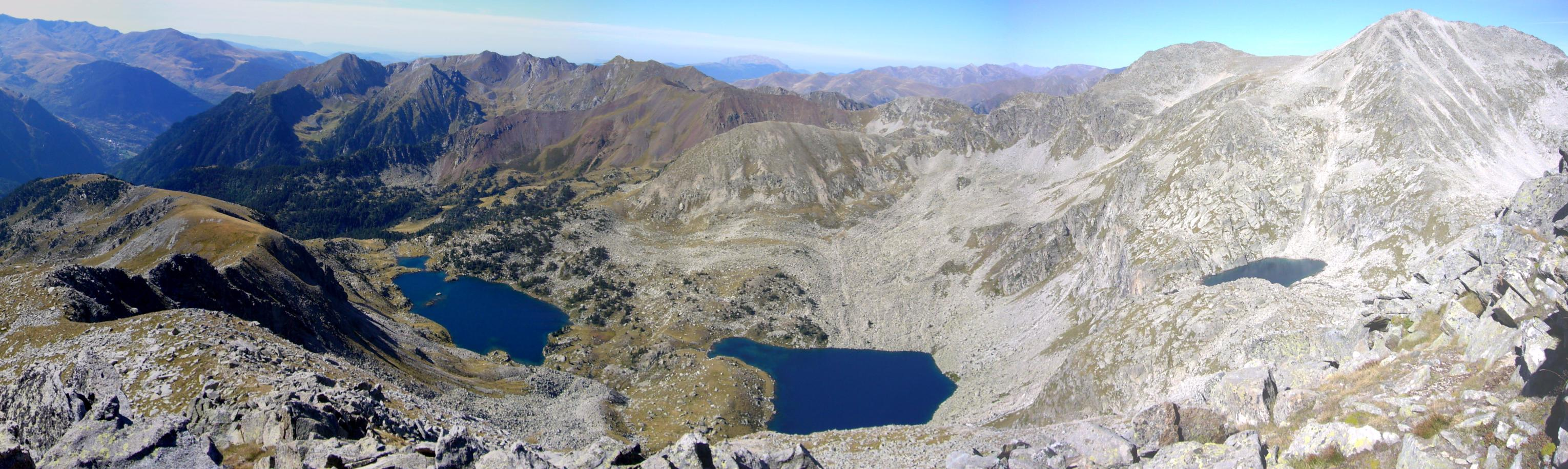 Circ de Gémena vist des de la Serra Plana; la Vall de Boí, Alta Ribagorça, Catalunya